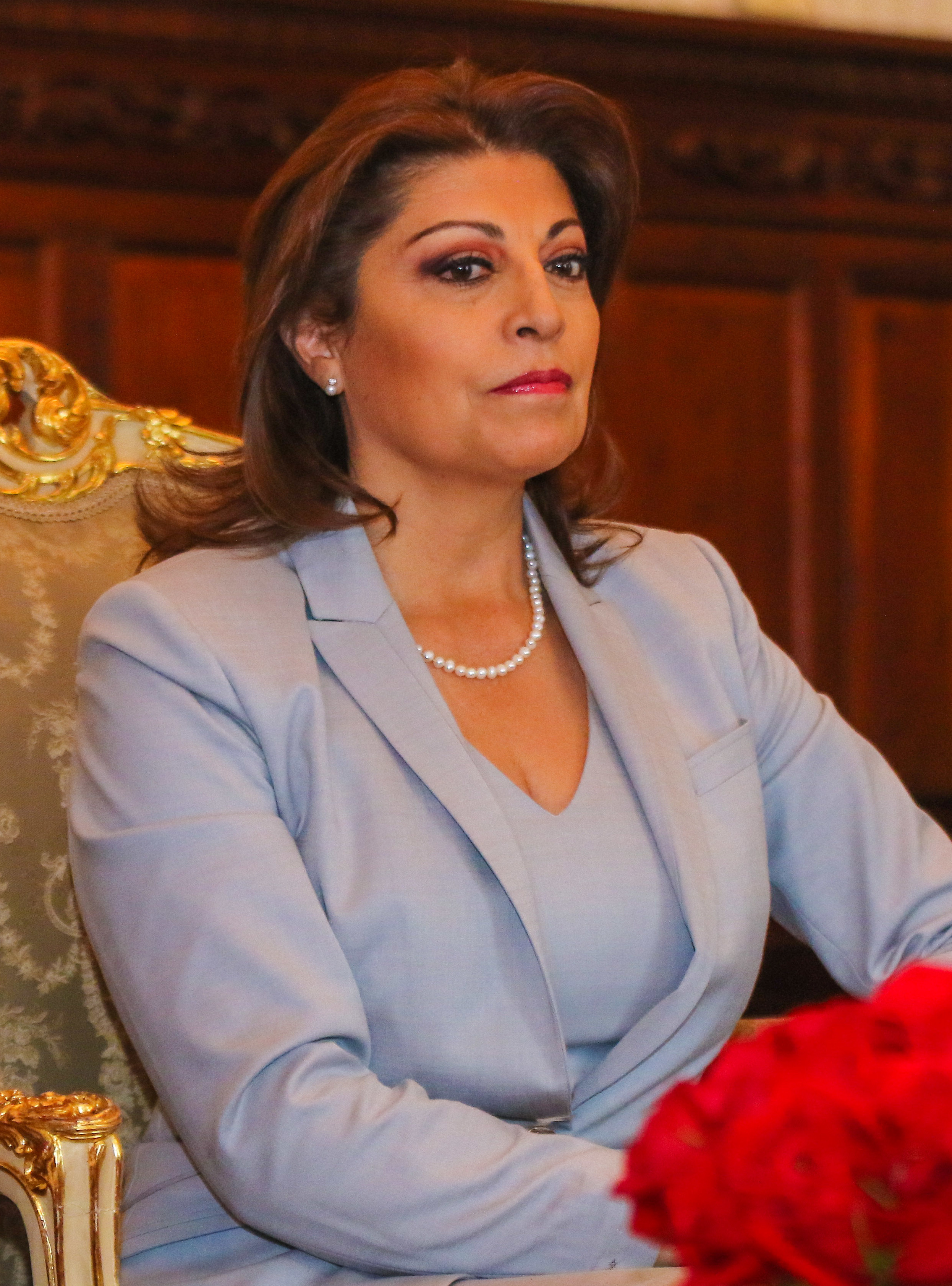 Quito 10 Jun (Andes).- El presidente Lenín Moreno recibió a Wilma Andrade, presidenta del partido Izquierda Democrática y René Yandún Asambleísta por ID para mantener un diálogo. Fotografías: Carlos Rodríguez/Andes. Quito 10 Jun (Andes).- El presidente Lenín Moreno recibió a Wilma Andrade, presidenta del partido Izquierda Democrática y René Yandún Asambleísta por ID para mantener un diálogo. Fotografías: Carlos Rodríguez/Andes.